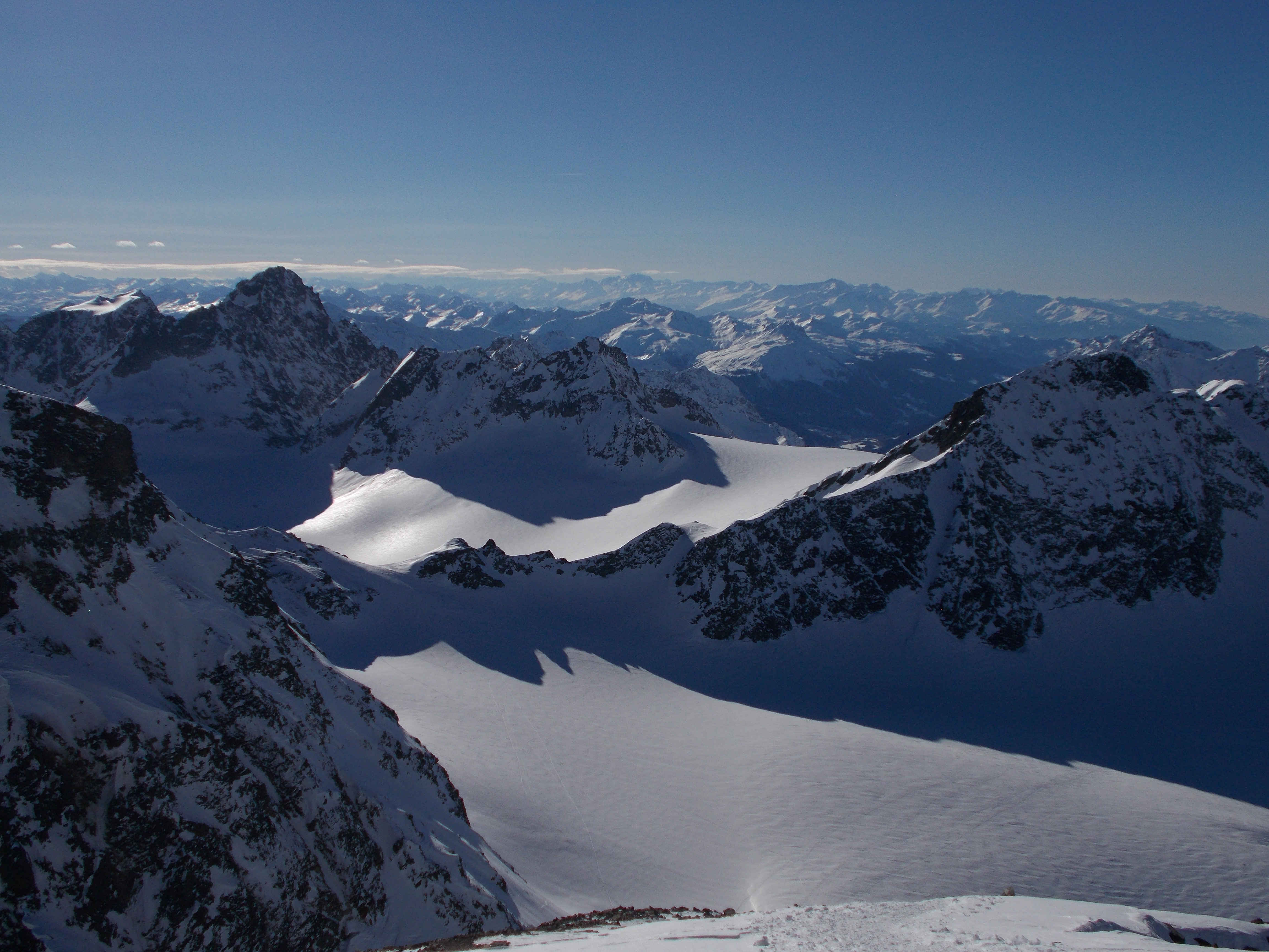 Aussicht vom Gipfel nach Westen. Furcola dal Confin im Vordergrund, links darüber Verstanclahorn. Signalhorn rechts vorn. Bei klarer Luft reicht der Blick bis zu den Bergen des Wallis und der Berner Alpen.